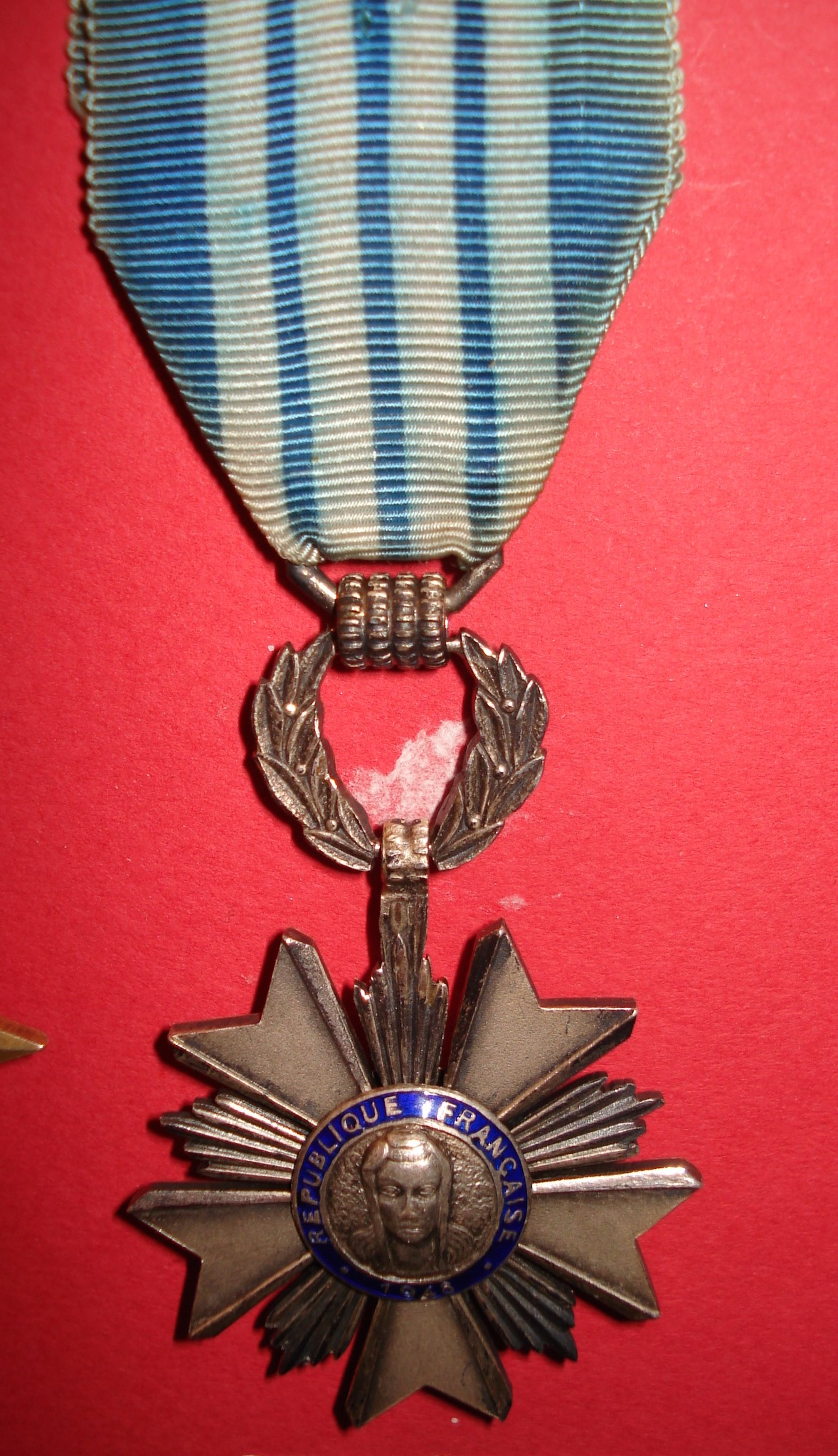 Insigne : Etoile à 5 branches métalliques formant dix pointes. A l'avers effigie de la République avec REPUBLIQUE FRANCAISE 1948 et au revers MERITE ARTISANAL - LABEUR - QUALITE